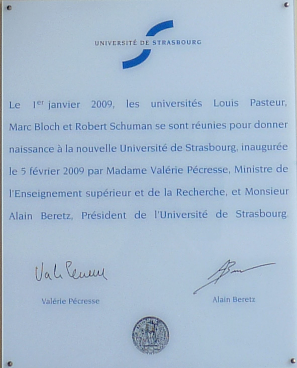 Plaque à l'entrée du Palais Universitaire de Strasbourg, commémorant la réunion des 3 universités le 1er janvier 2009. Signatures de Valérie Pécresse et Alain Beretz qui ont inauguré la nouvelle université le 5 février 2009.